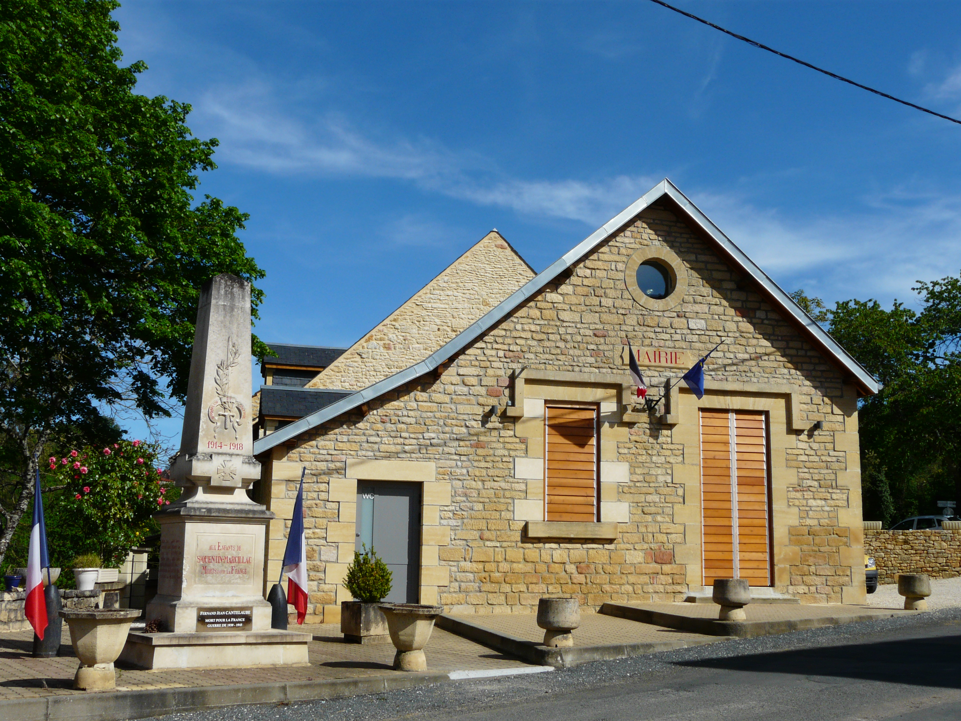 Le monument aux morts et la mairie de Marcillac-Saint-Quentin, Dordogne, France.